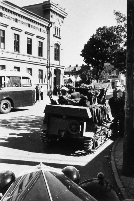 Heeresfilmstelle Bildarchiv Litauische Aktivisten. Heeresgruppe Nord. Aufnahme: 25.6.41 Ort: Kowno Bildberichter: Barschdorff Negativ-Nr. K1 1/28